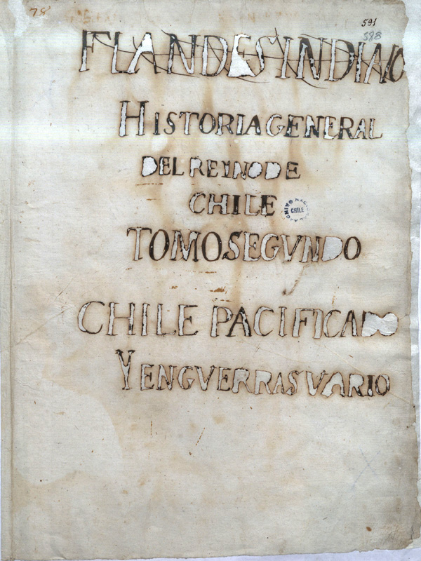 Diego de Rosales. Historia General del Reino de Chile. Flandes Indiano. Tomo segundo: Chile pacificado y en guerras varias. Siglo XVII. Archivo Nacional Histórico. En Bóveda